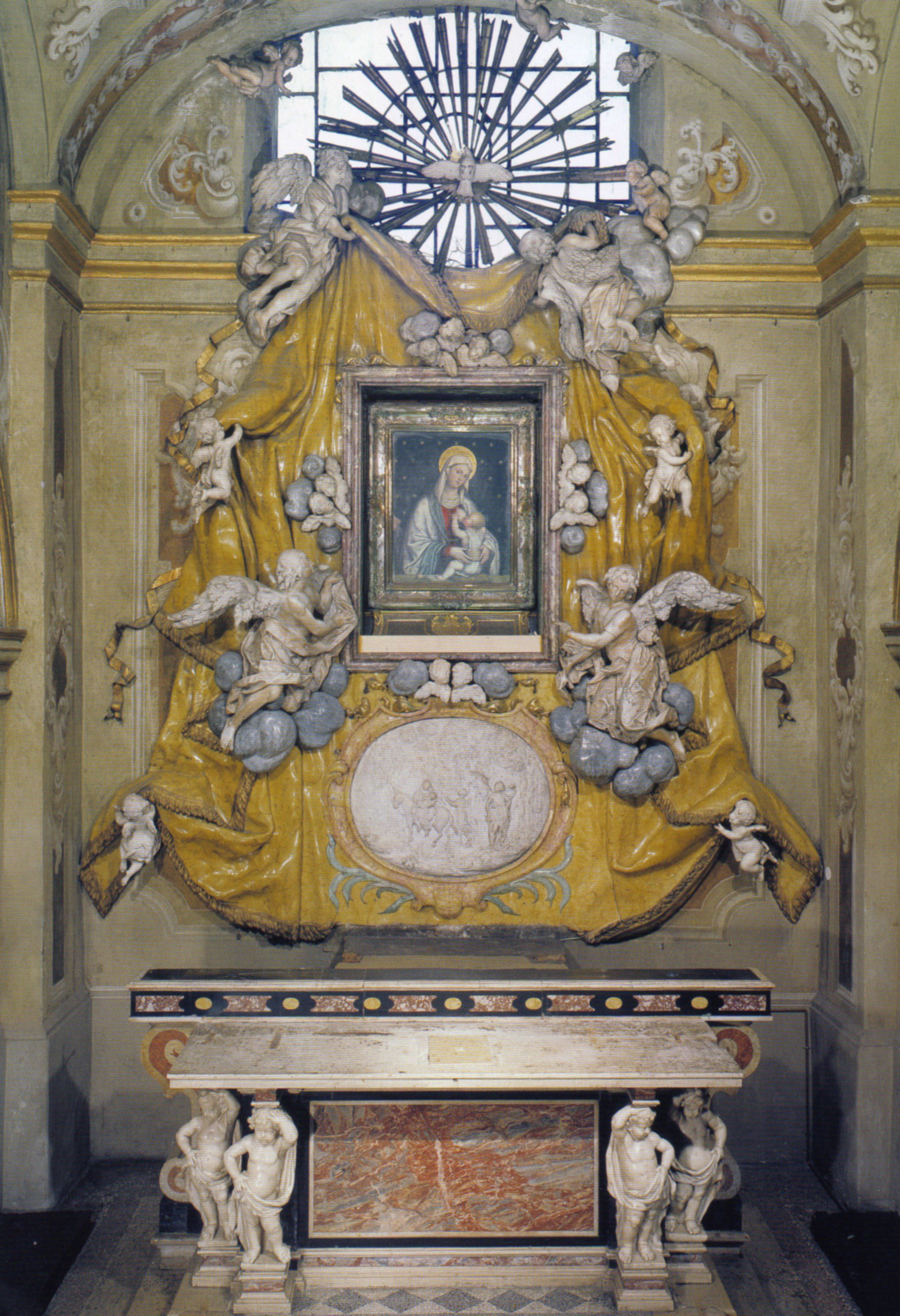 Cappella della madonna del tabarrino, san giovanni evangelista, Brescia (Alessandro Calegari)